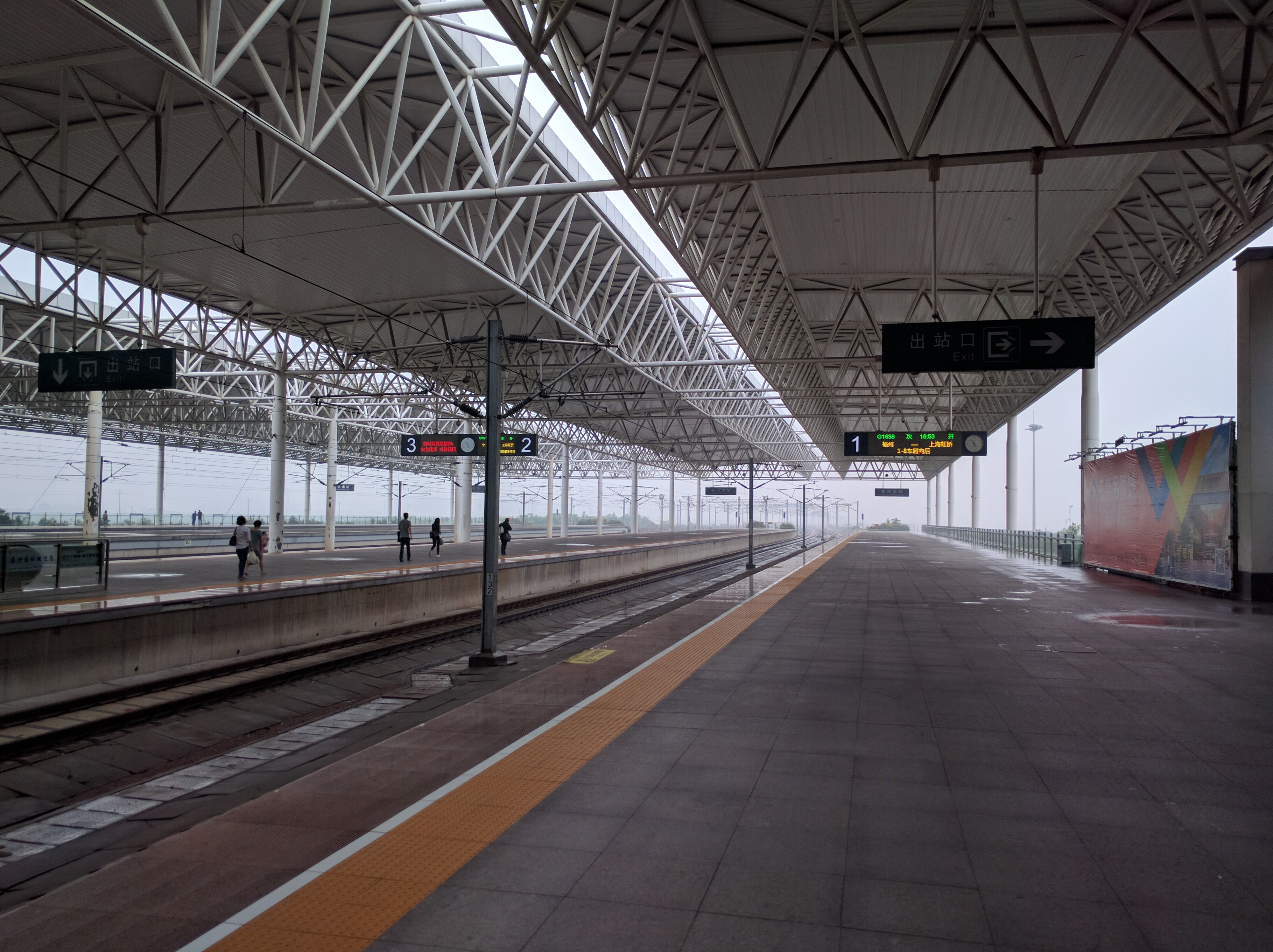 中文（中国大陆）: 嘉兴南站站台